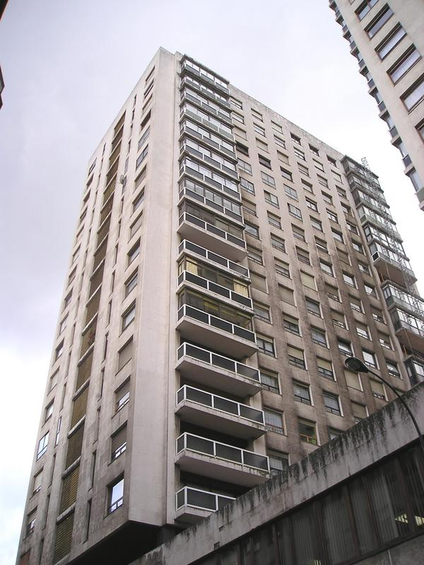 Eibarko Unzaga dorrearen ikuspegia.